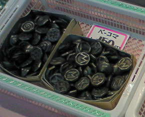 Beigoma ベーゴマ